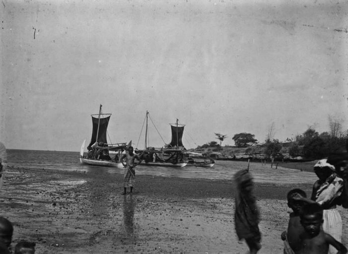 Foto. Java, Plaläan, strand met visprauwen